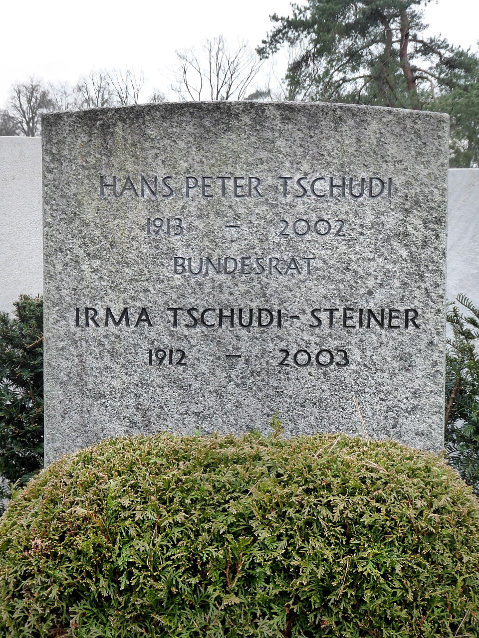 Hans-Peter Tschudi-Steiner (1913–2002) Dr.jur., Professor a.o. für Arbeits- und Sozialversicherungs-recht, Politiker, Bundesrat-Innenminister, Bundespräsident, Grab auf dem Friedhof Hörnli, Riehen, Basel-Stadt